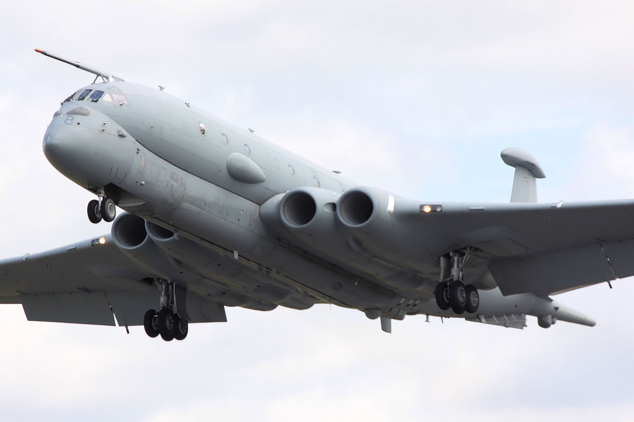 Nimrod - RIAT 2009